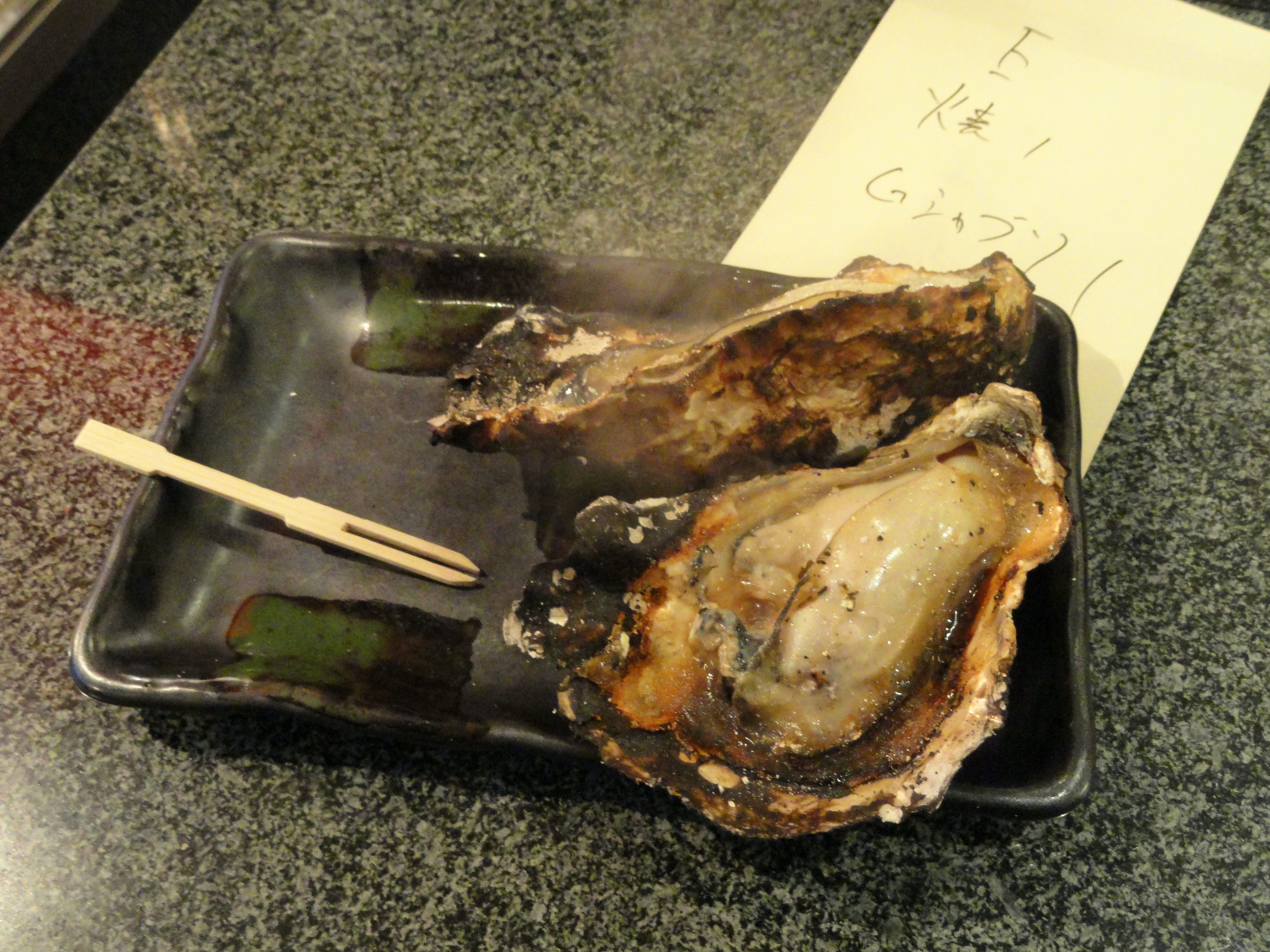 Food in Miyajima, Hatsukaichi, Hiroshima, Japan.